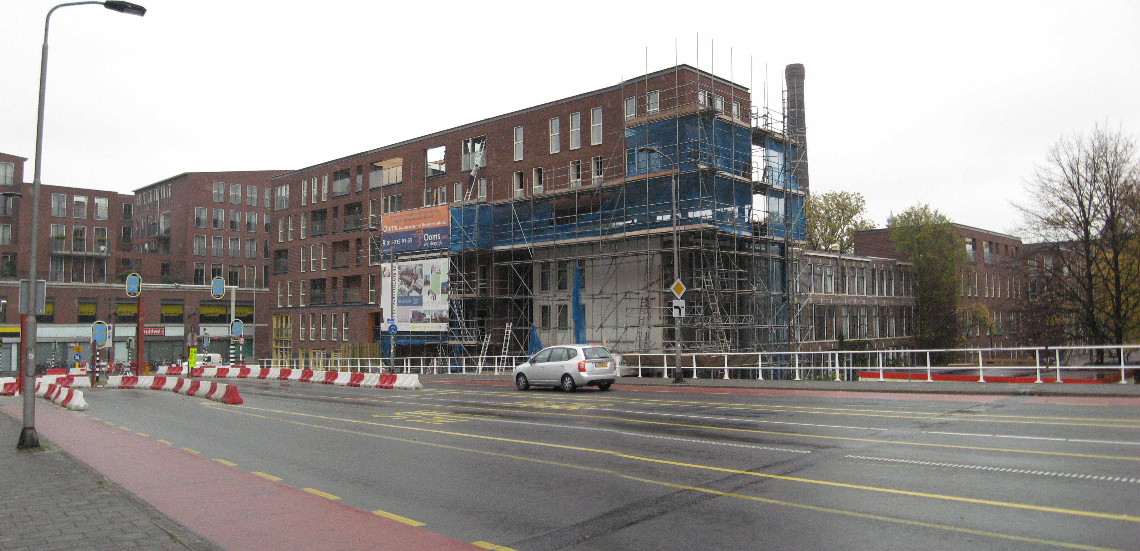 Overbouwing van de Ruyterhoeck over de professorenwoningen